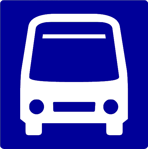 Icono del servicio Urbano del SITP.